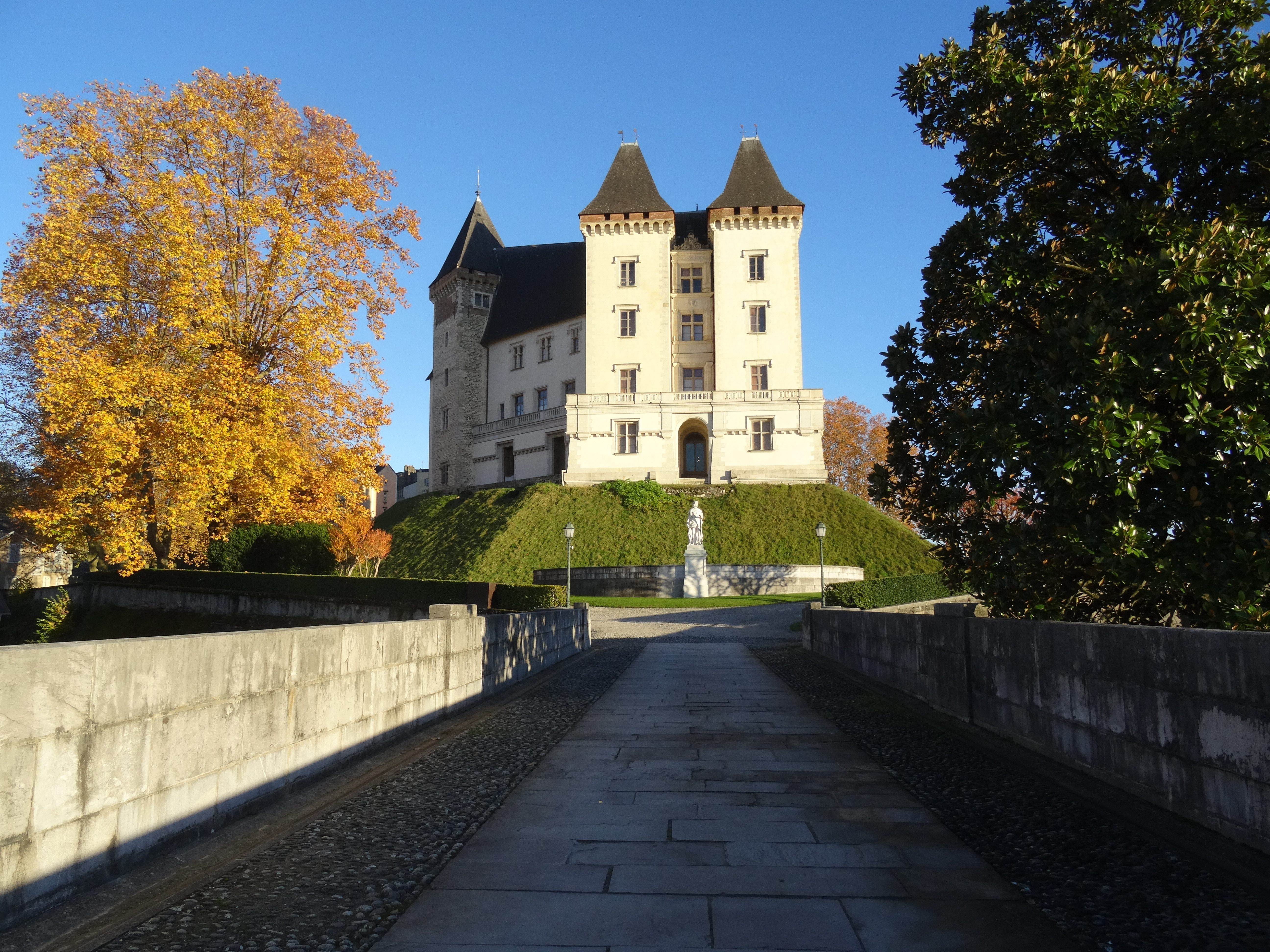 Le château de Pau vu depuis le jardin de la basse-plante